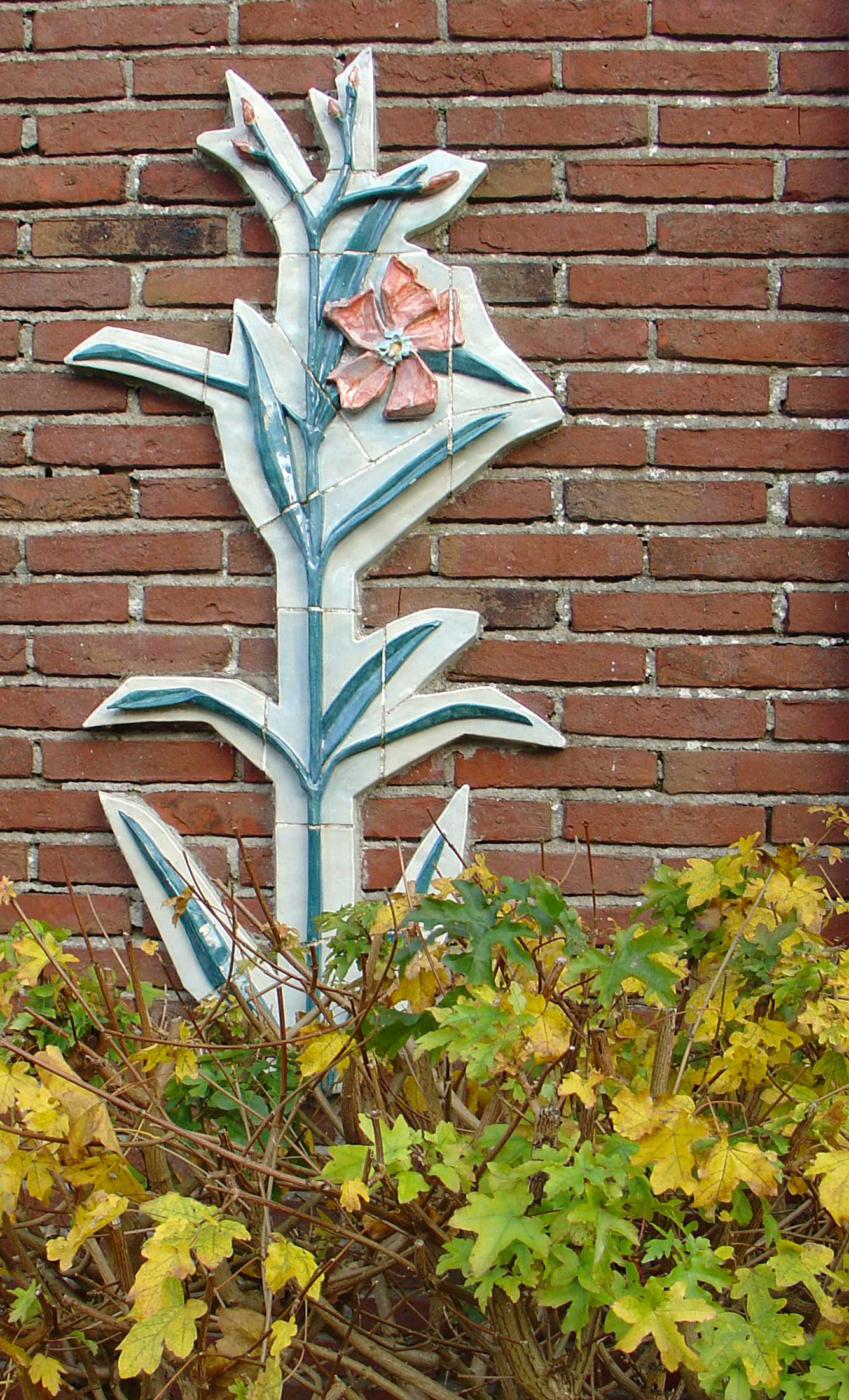 Oleander door Johan Broekema gevel obs Meidoornstraat (1992)